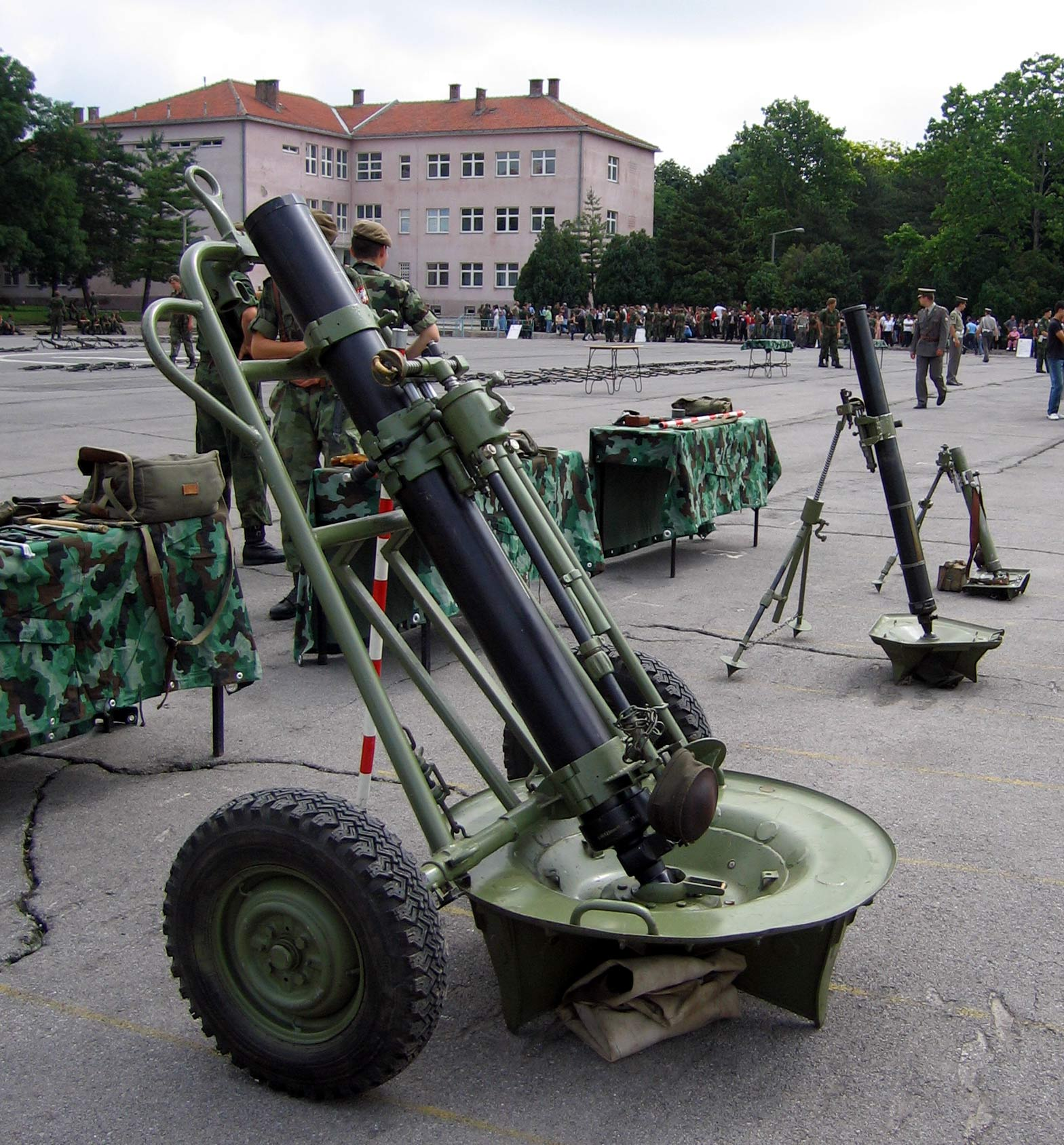 Минобацач М95 120мм, маршевни положај.